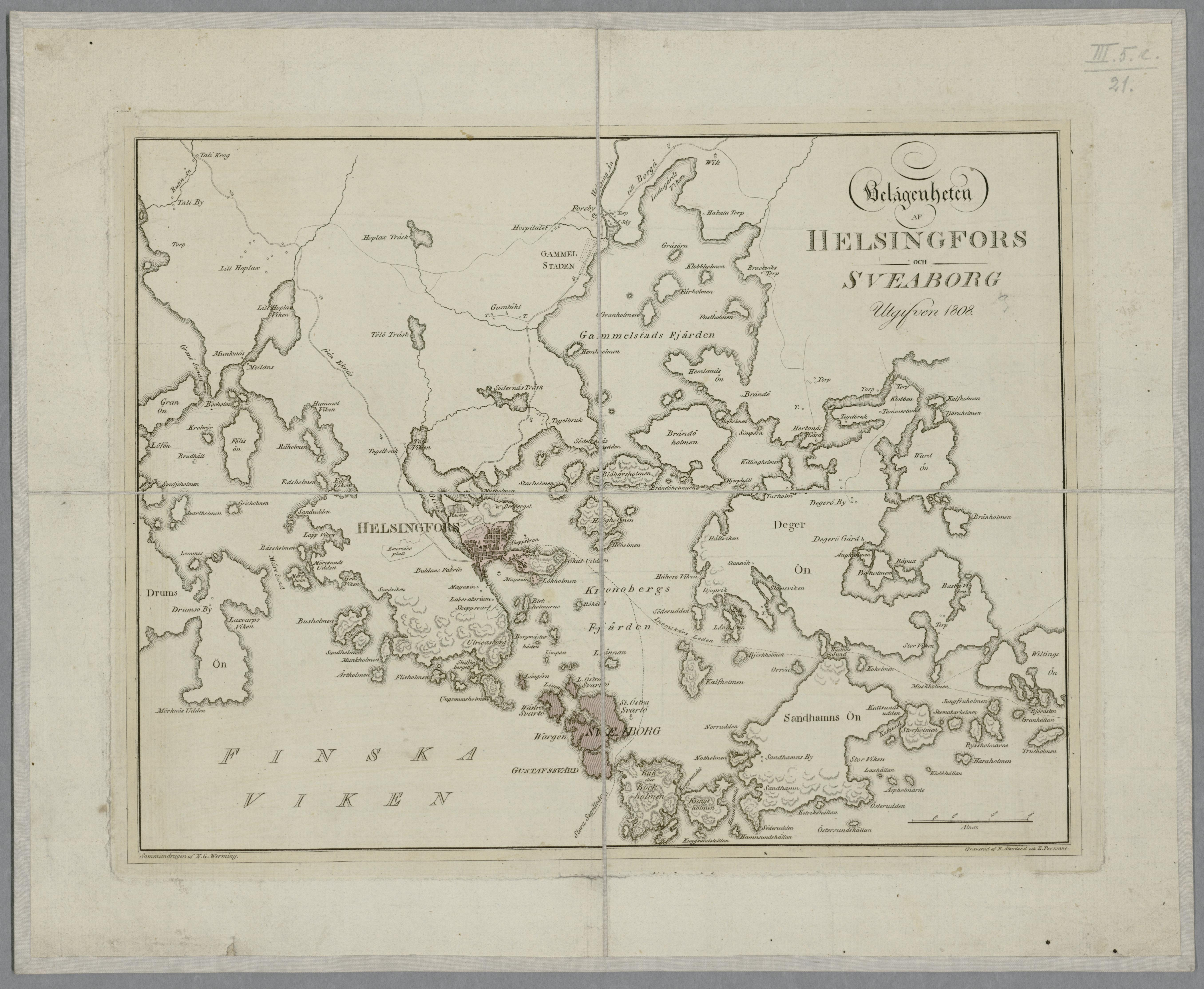 Mittakaava laskettu janamittakaavasta.